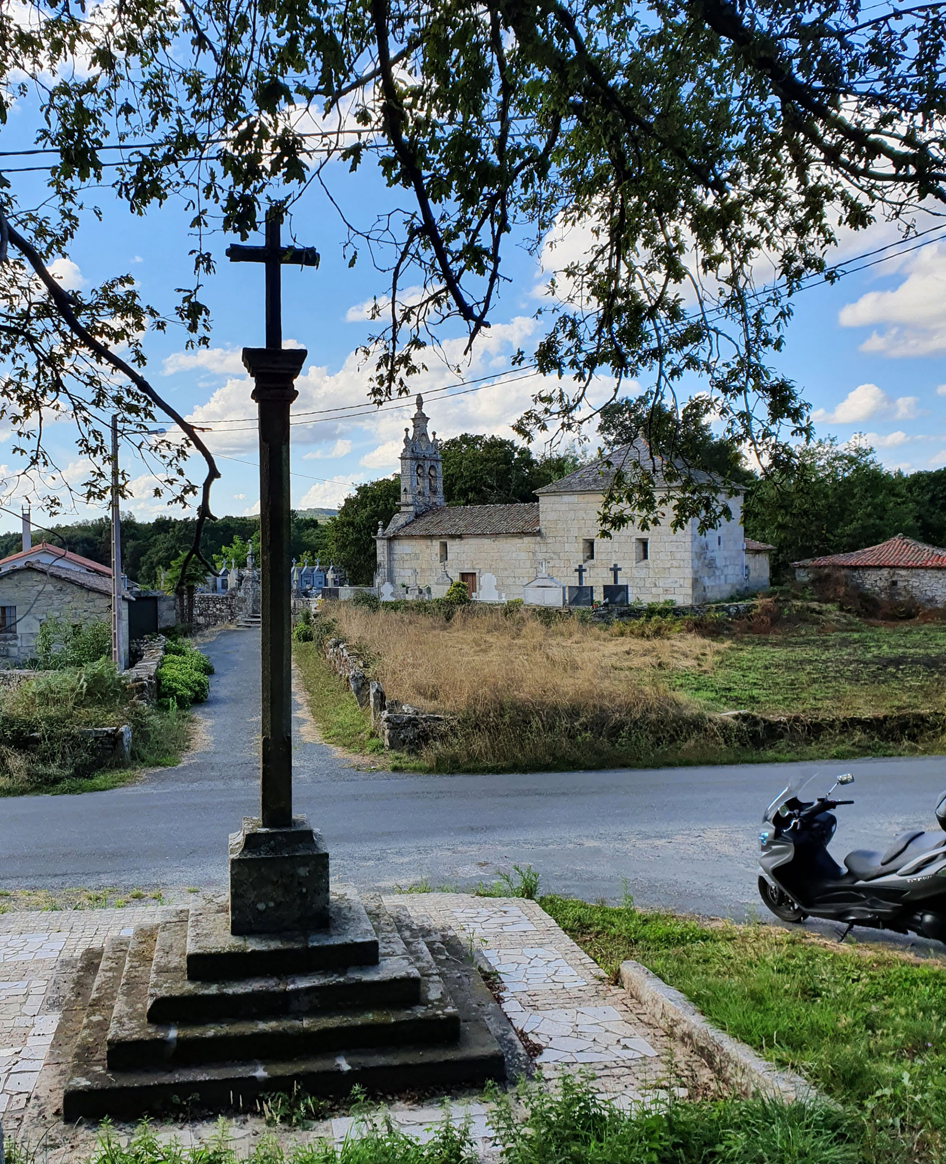 Lugar de Arada, na parroquia monterrosina do mesmo nome.